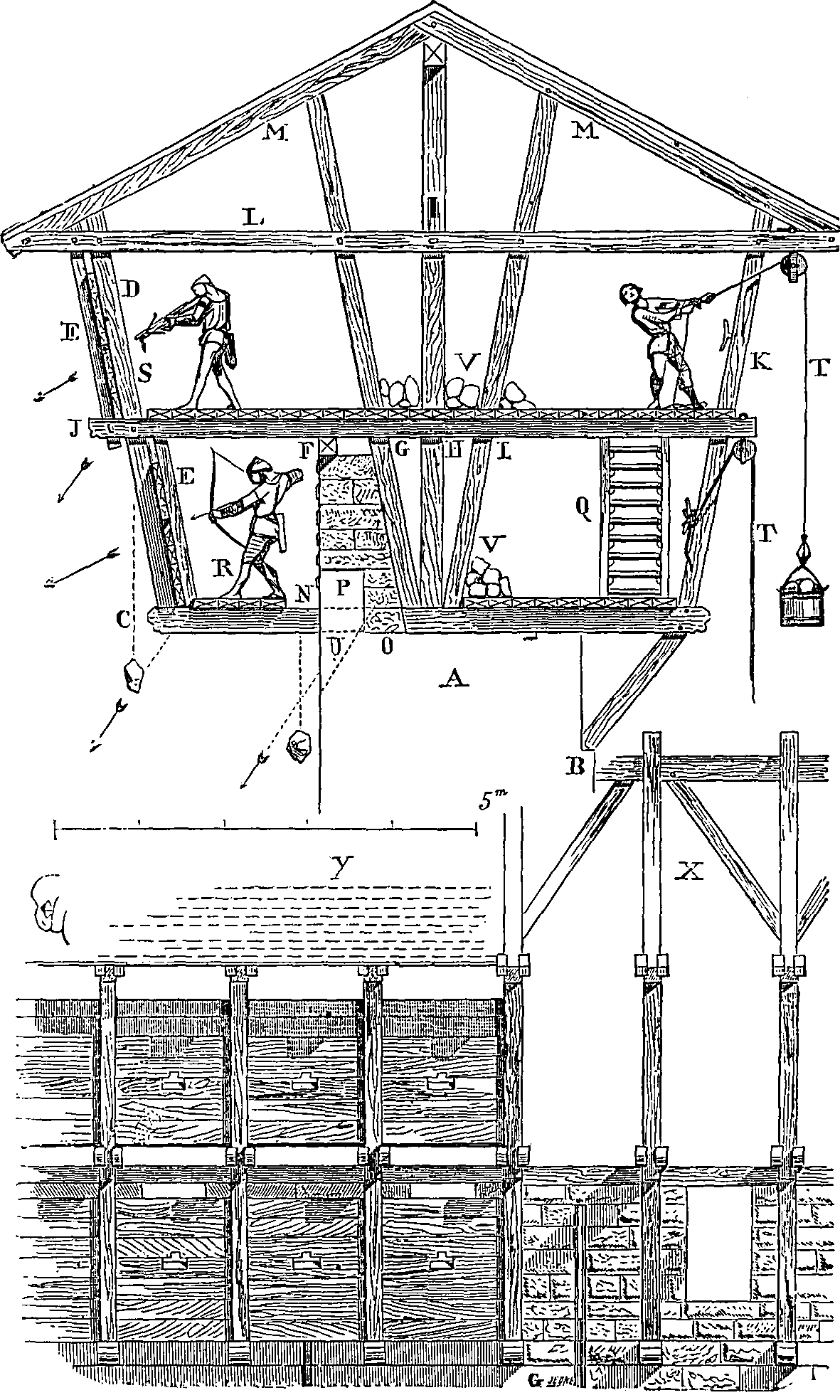 Dessin extrait de l'ouvrage La cité de Carcassonne par Eugène Viollet-le-Duc. Le dessin est intitulé : Figure N°5. Notice Gallica : Type : texte imprimé, monographie Auteur(s) : Viollet-le-Duc, Eugène-Emmanuel (1814-1879). Auteur du texte Titre(s) : La cité de Carcassonne (Aude) [Texte imprimé] / par Viollet Le Duc Publication : Paris : Librairie des imprimeries réunies, 1888 Description matérielle : 85 p. : ill. ; in-8 Sujet(s) : Carcassonne (Aude) -- Cité -- Histoire Notice n° : FRBNF36570974